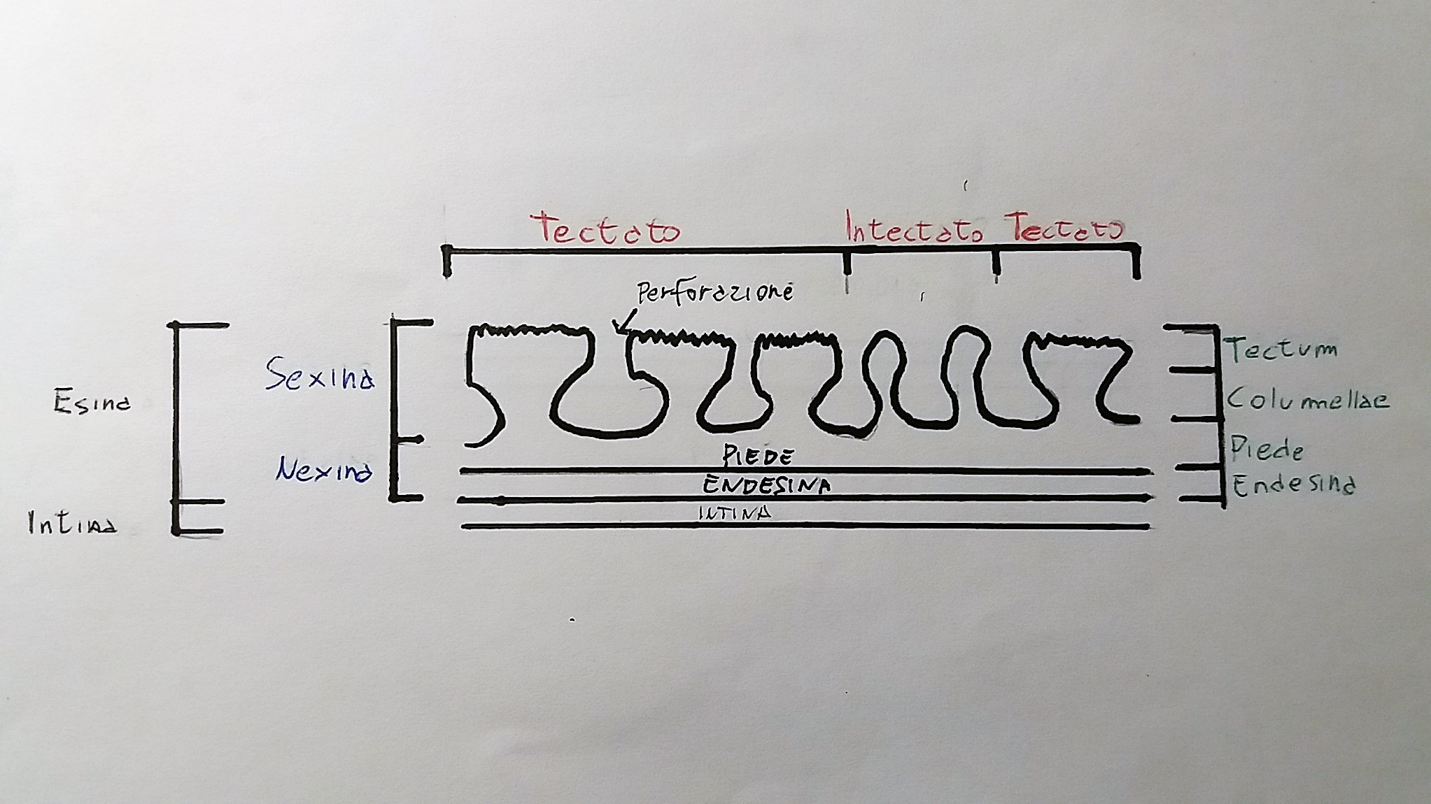 Sezione della parete pollinica di un'angiosperma.